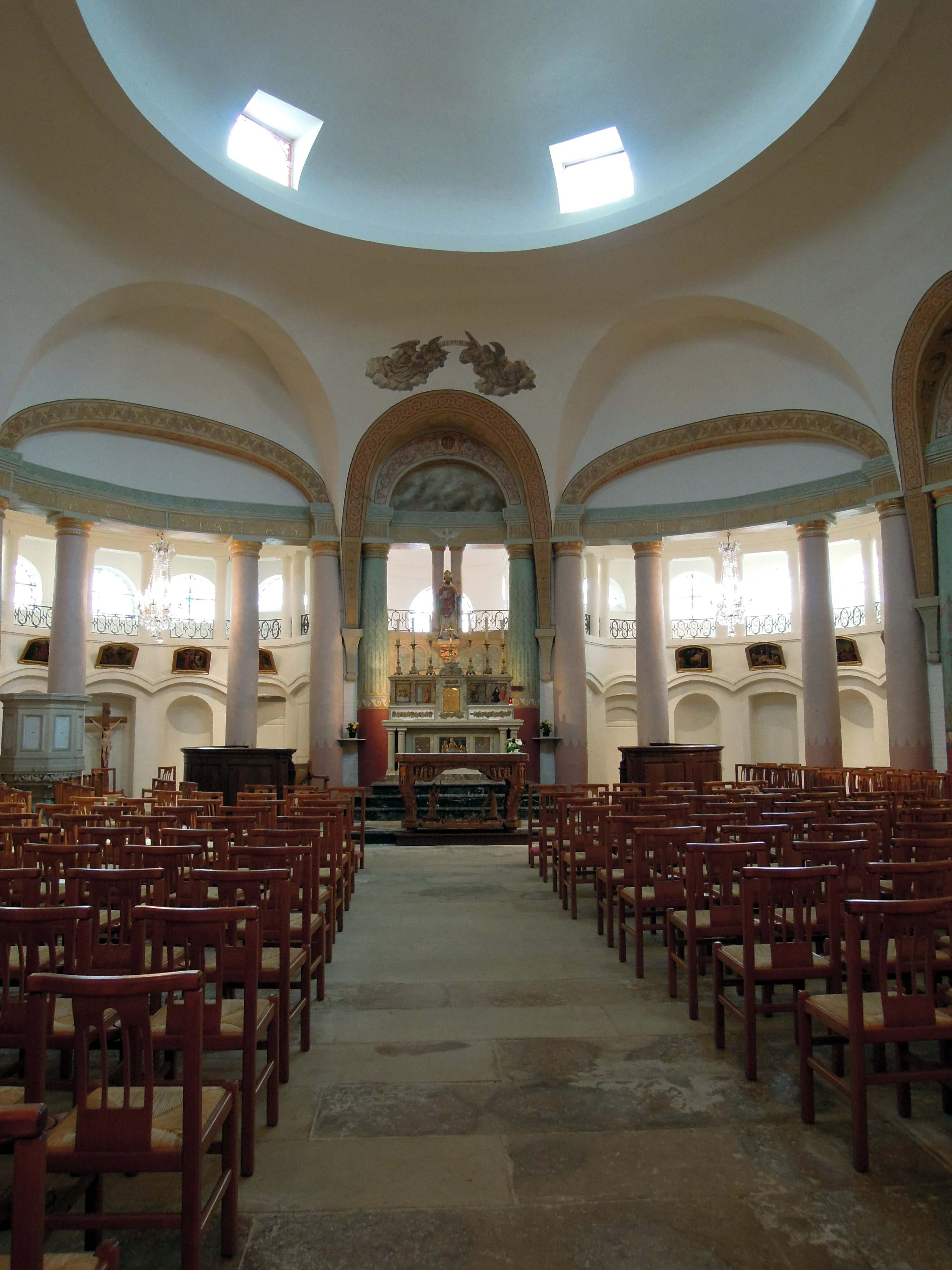 le choeur de l'église Saint Didier d'Asfeld Ardennes .